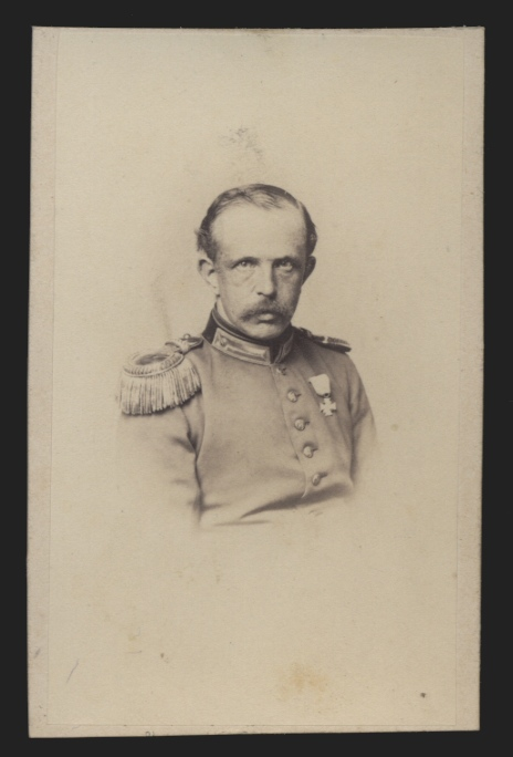 Der württembergische Kriegsminister Theodor von Wundt (1825-1883)